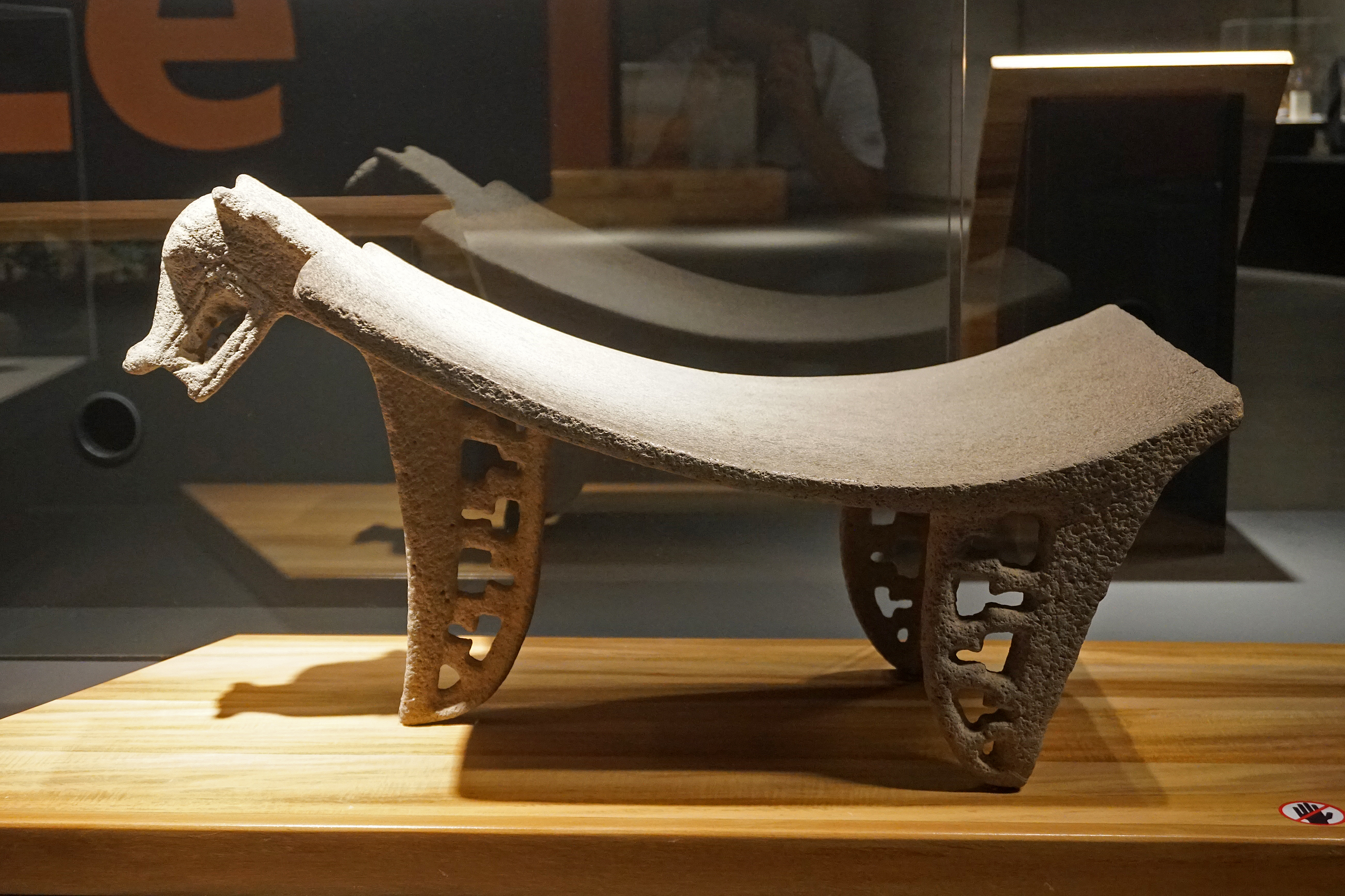 Metate de piedra con cabeza de jaguar exhibido en el Museo de Oro Precolombino, San José, Costa Rica